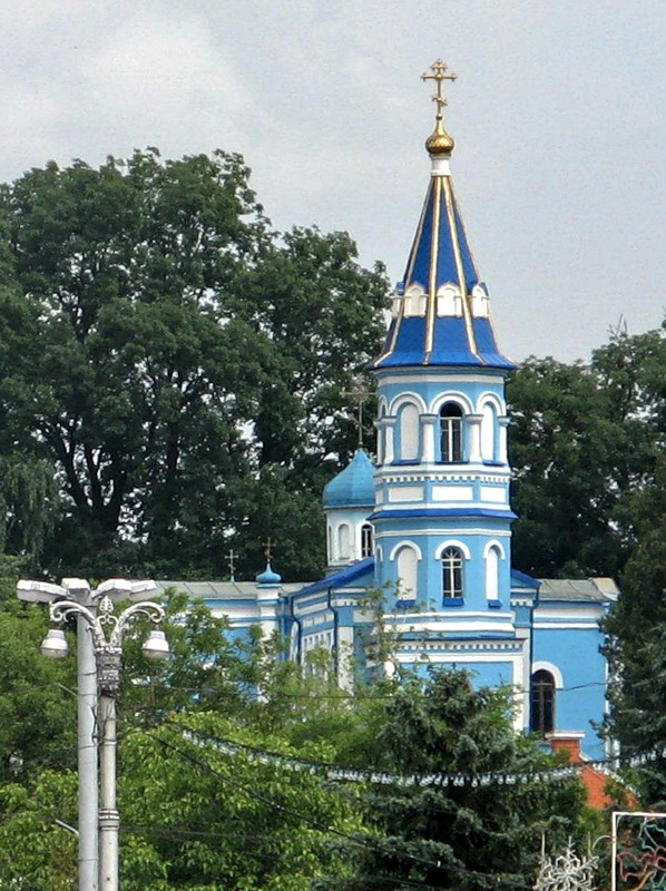 Ирон: Дзæуджыхъæу. Сахары администрацийы хæдзар, телеуынынады мæсыг æмæ Иры аргъуаны уынд.